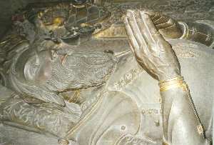 Stiftskirche Tübingen, Grablege im Chor. Grabmal des Herzogs Eberhard im Bart von Württemberg